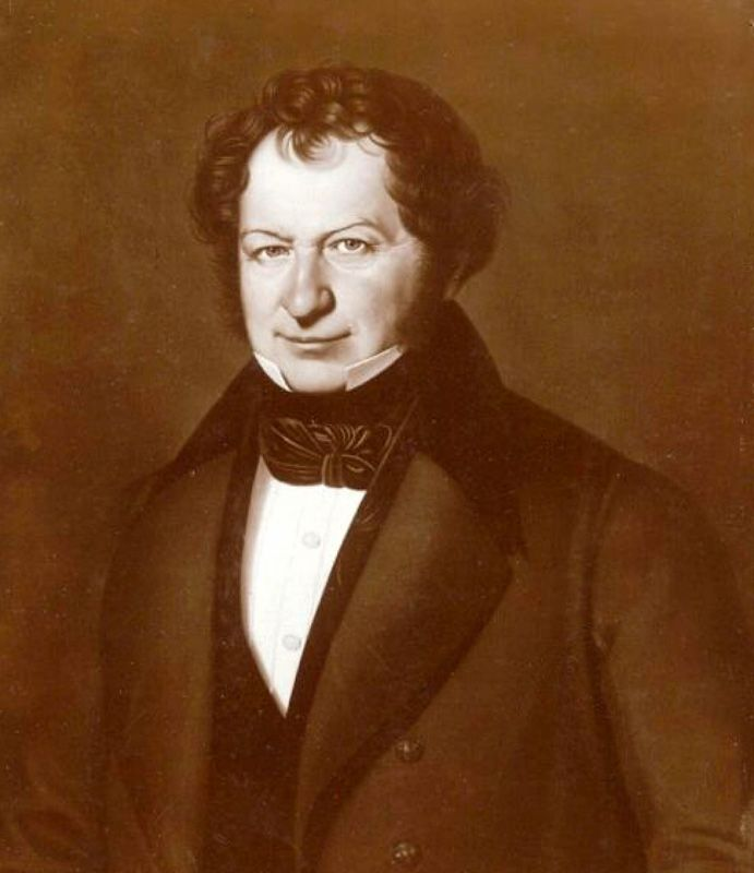 Der Leipziger Papiergroßhändler Ferdinand Traugott Flinsch